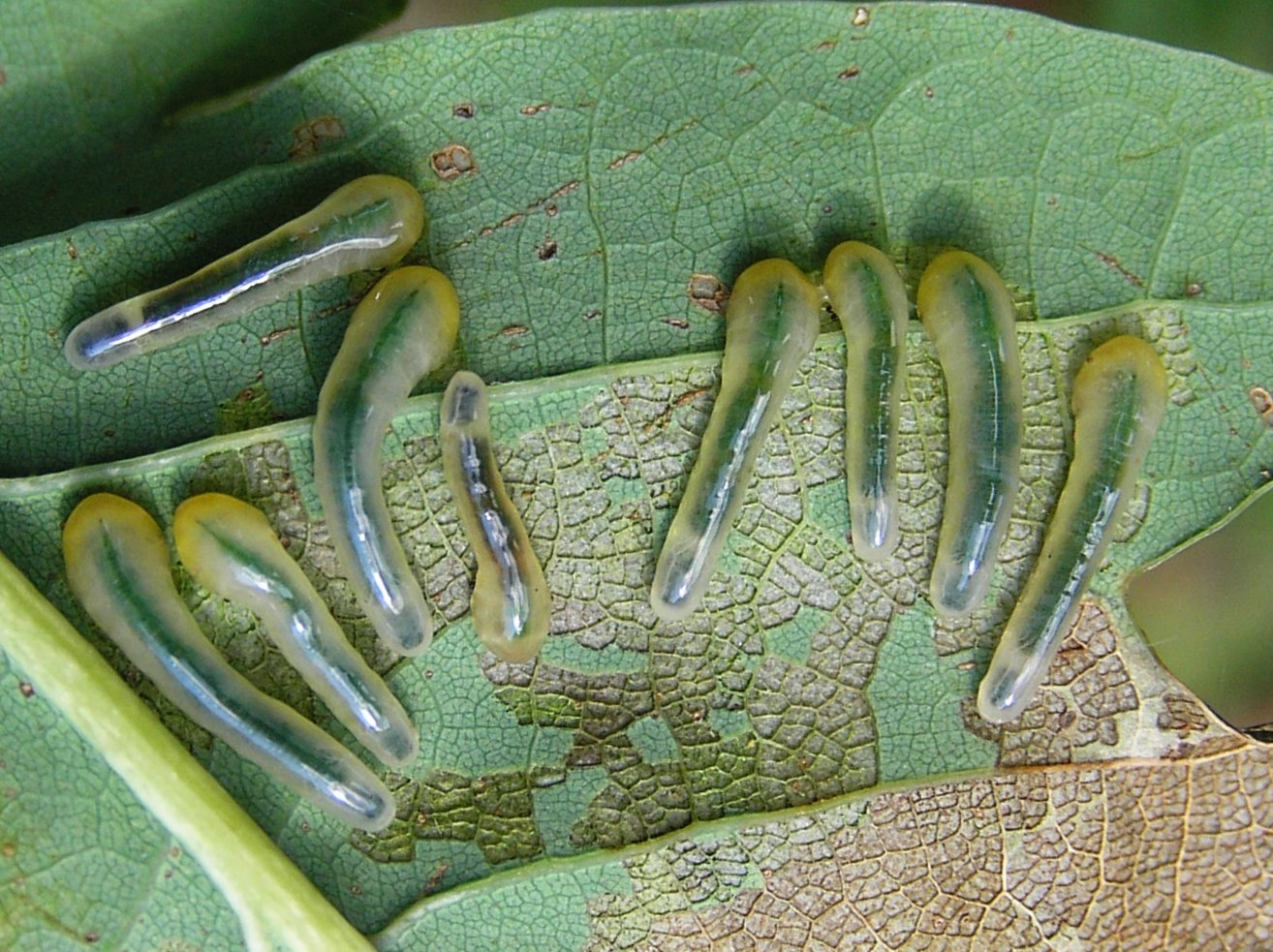 Caliroa annulipes, larva, Brok, Polska